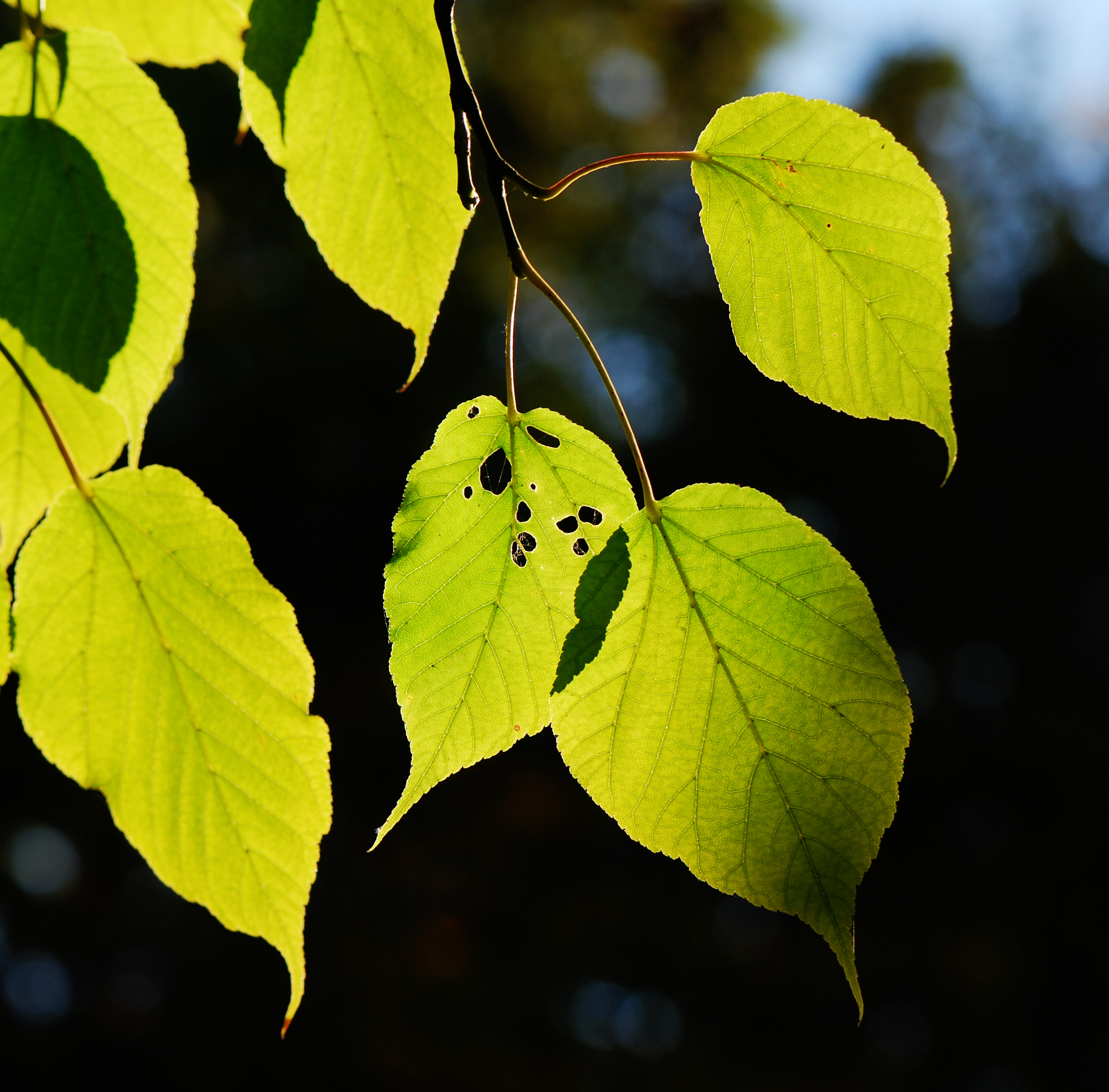 Arboretum du Breuil, Parc de Vincennes, Paris